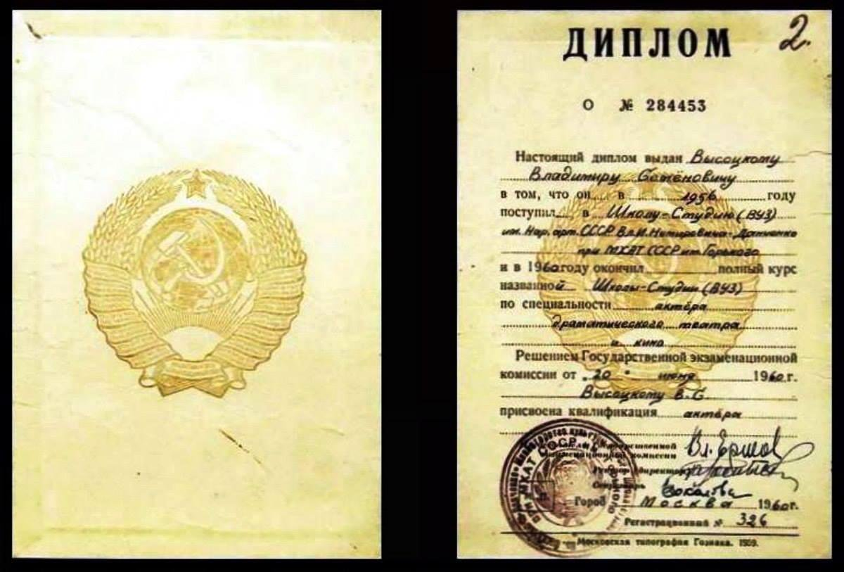 Диплом Школы-студии МХАТ Владимира Высоцкого